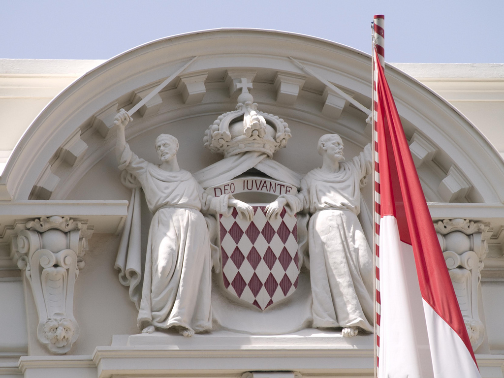 armoiries des Grimaldi orn�s de deux moines en armes